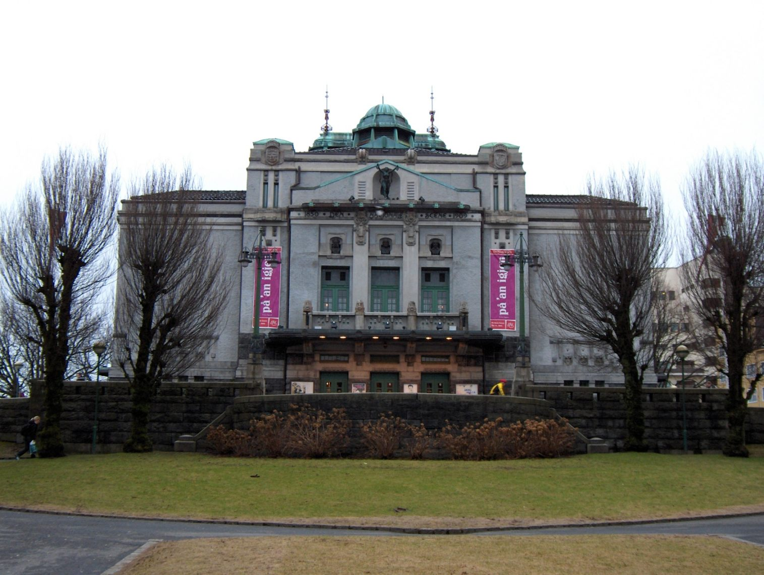 Théâtre National in Bergen